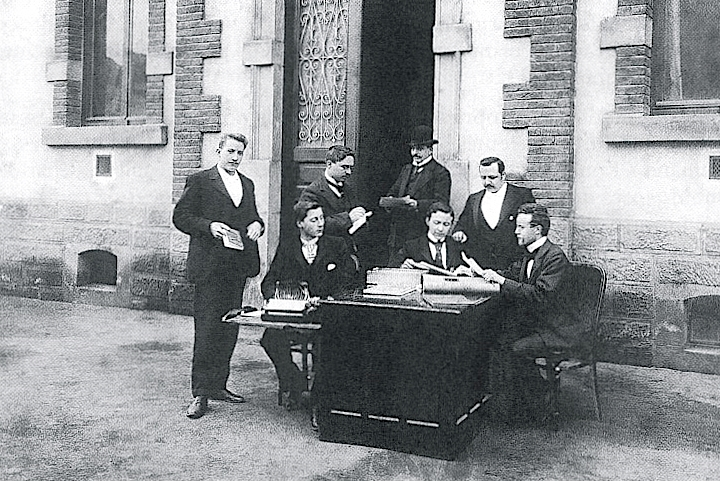 Max Meier (hinten, mit Melone), mit Personal seines Büros in Differdingen